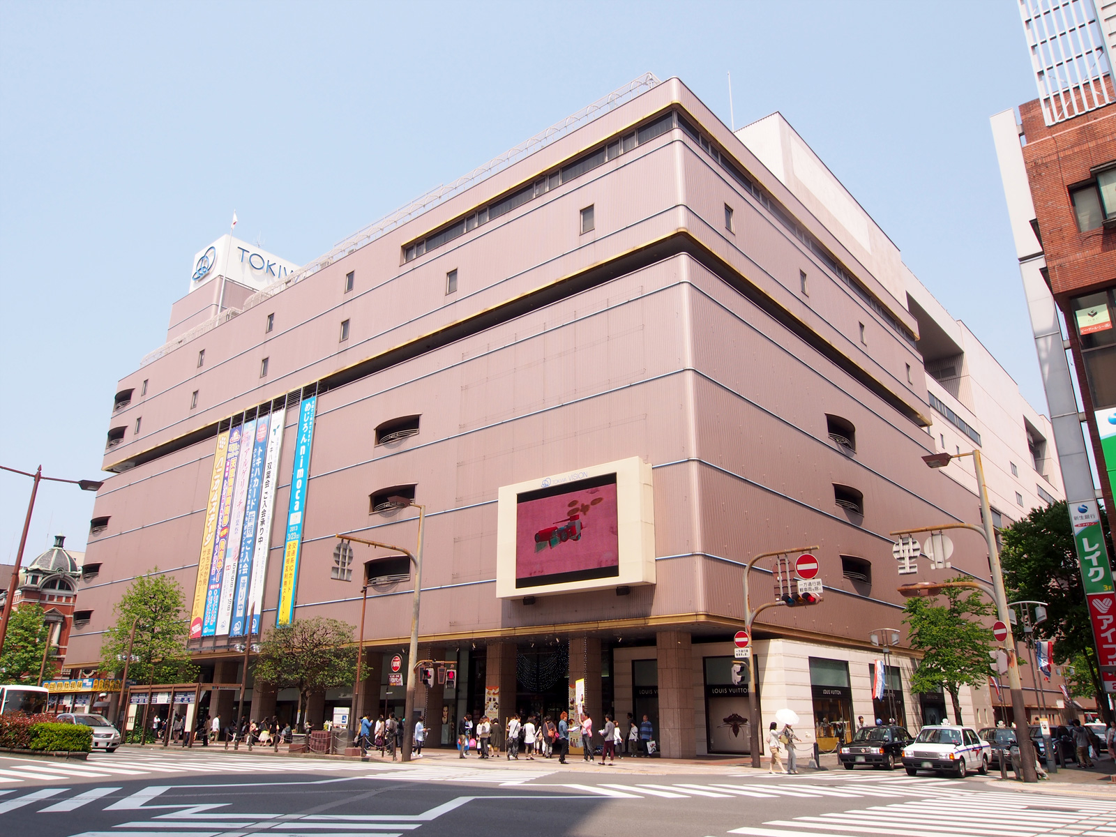 トキハ本店（大分県大分市）